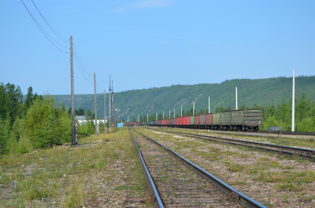 Железнодорожный разъезд Денисовский в 19 км к северу от Нерюнгри-Пассажирской